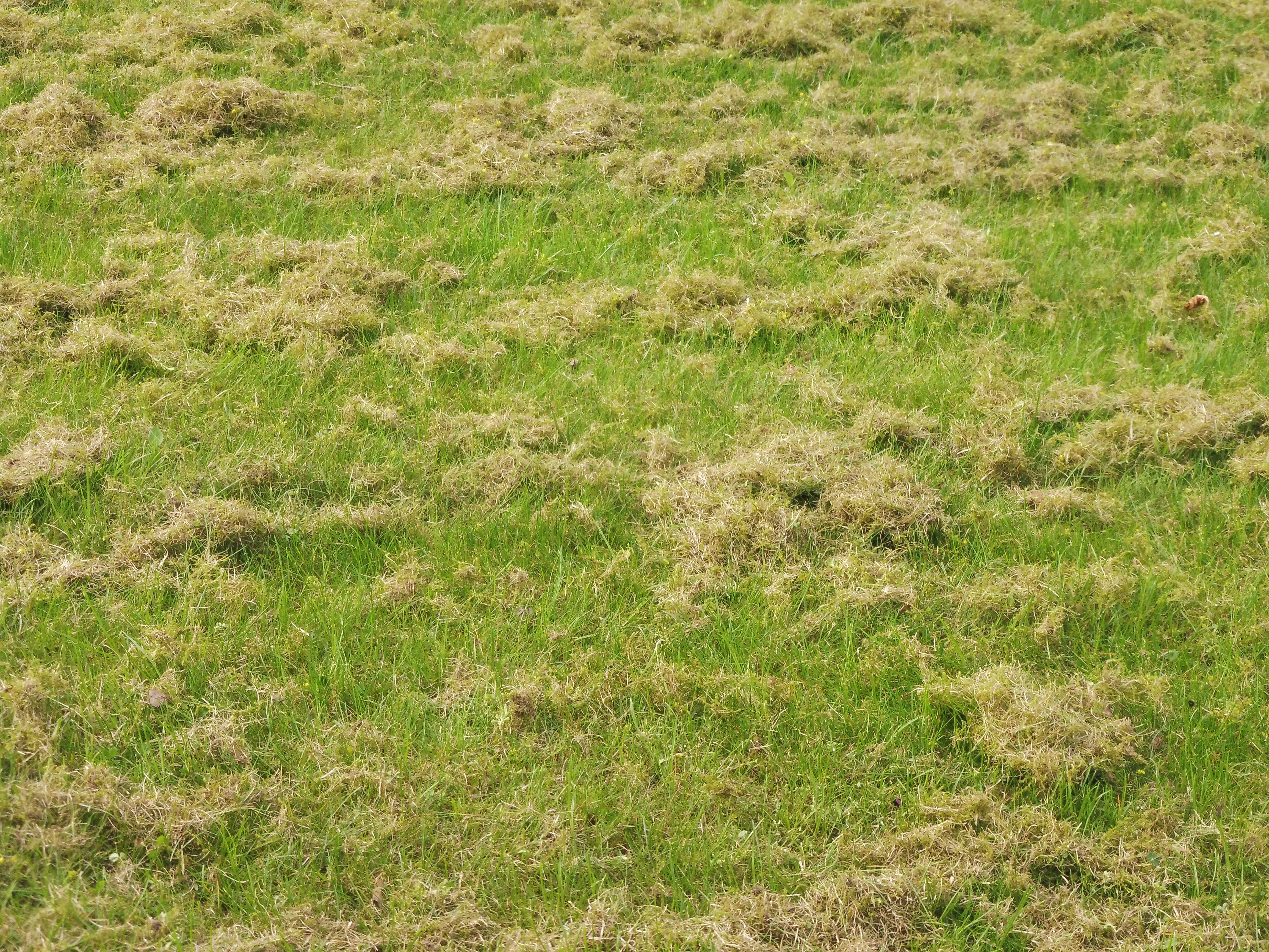 Vertikutierter Frühlingsrasen